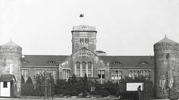 国立山东大学复校